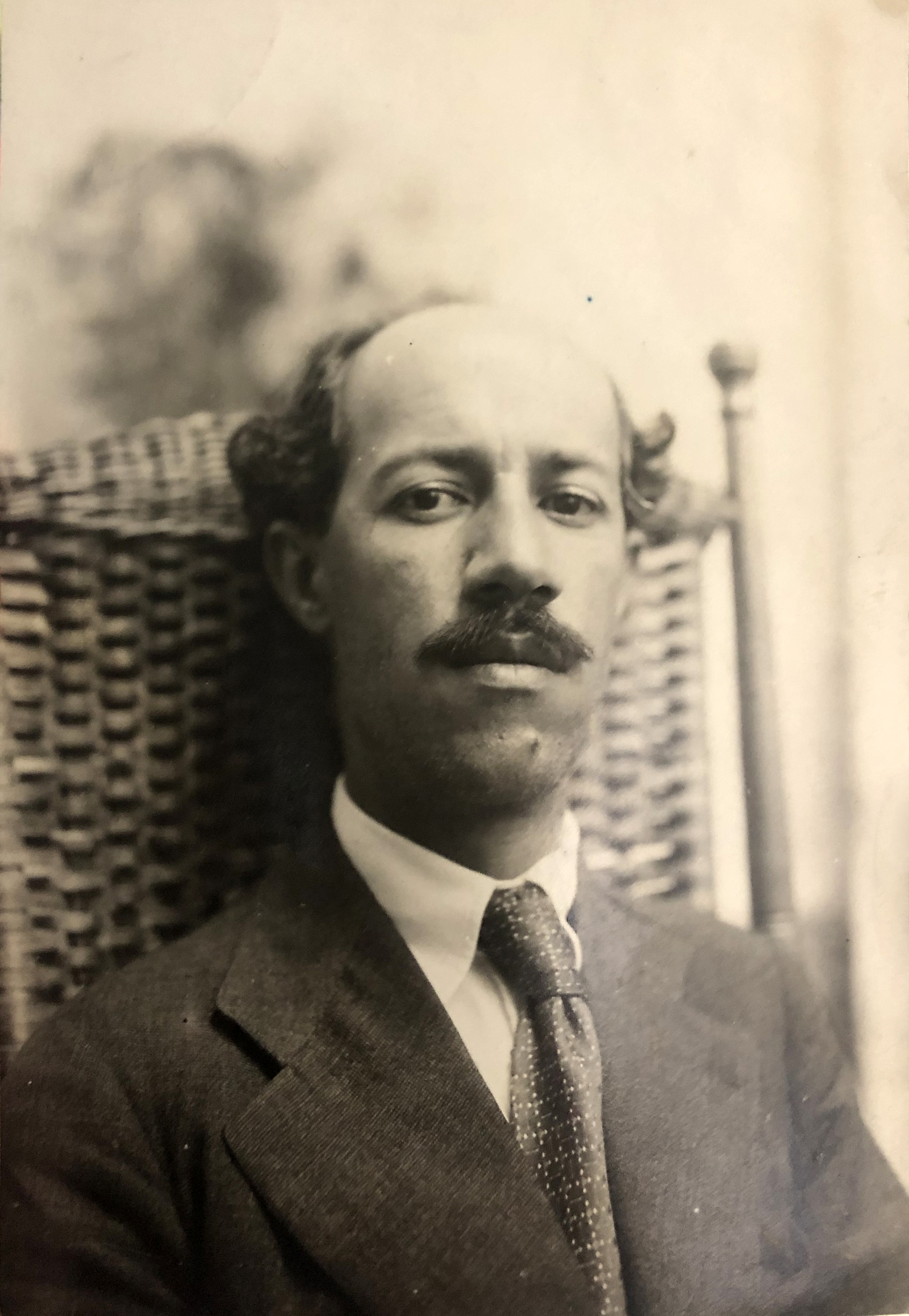 Fotografía del compositor mexicano José Pomar, tomada probablemente en la década de 1920.